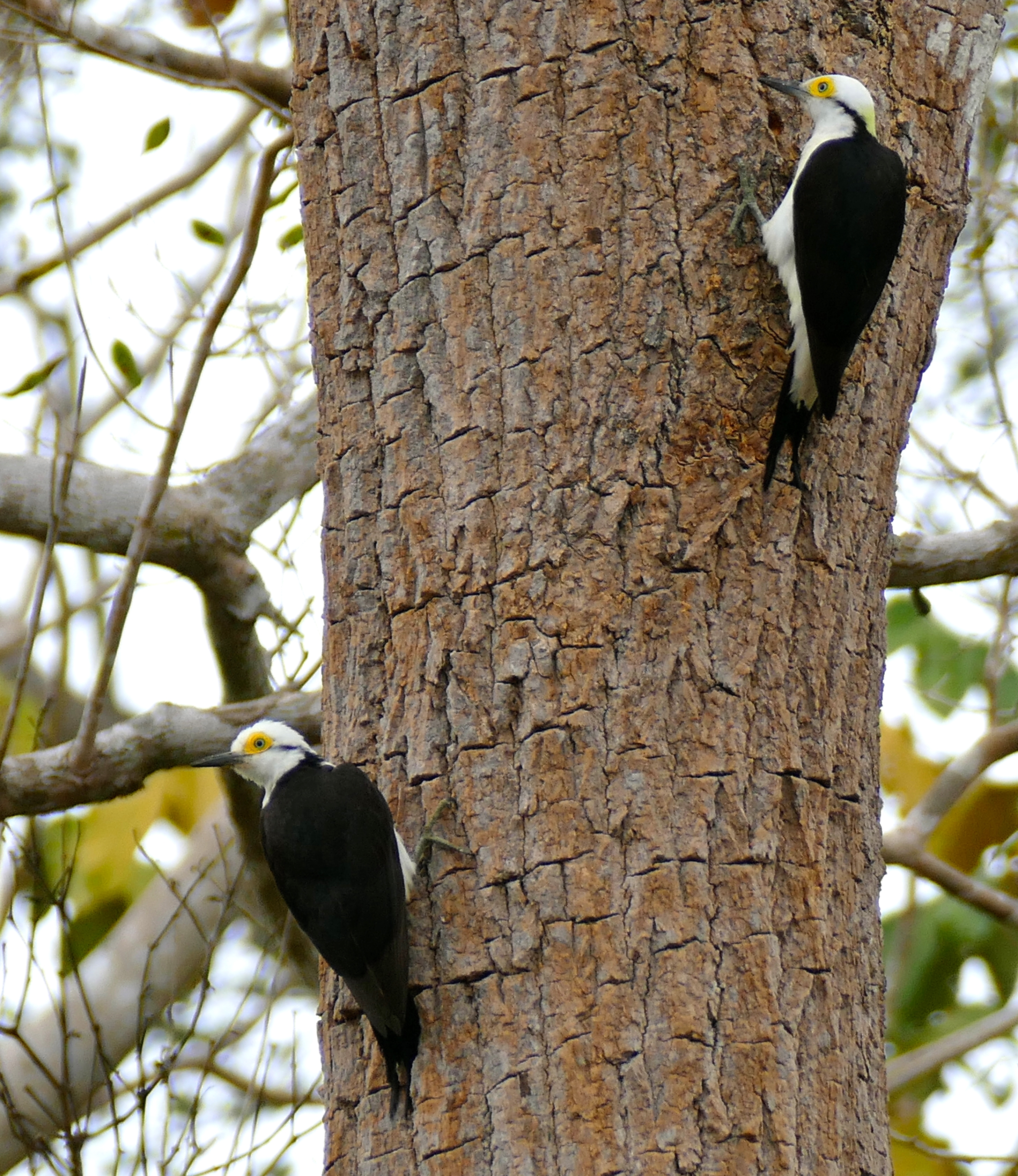 Pouso Alegre, Transpantaneira, Poconé, Mato Grosso, BRAZIL